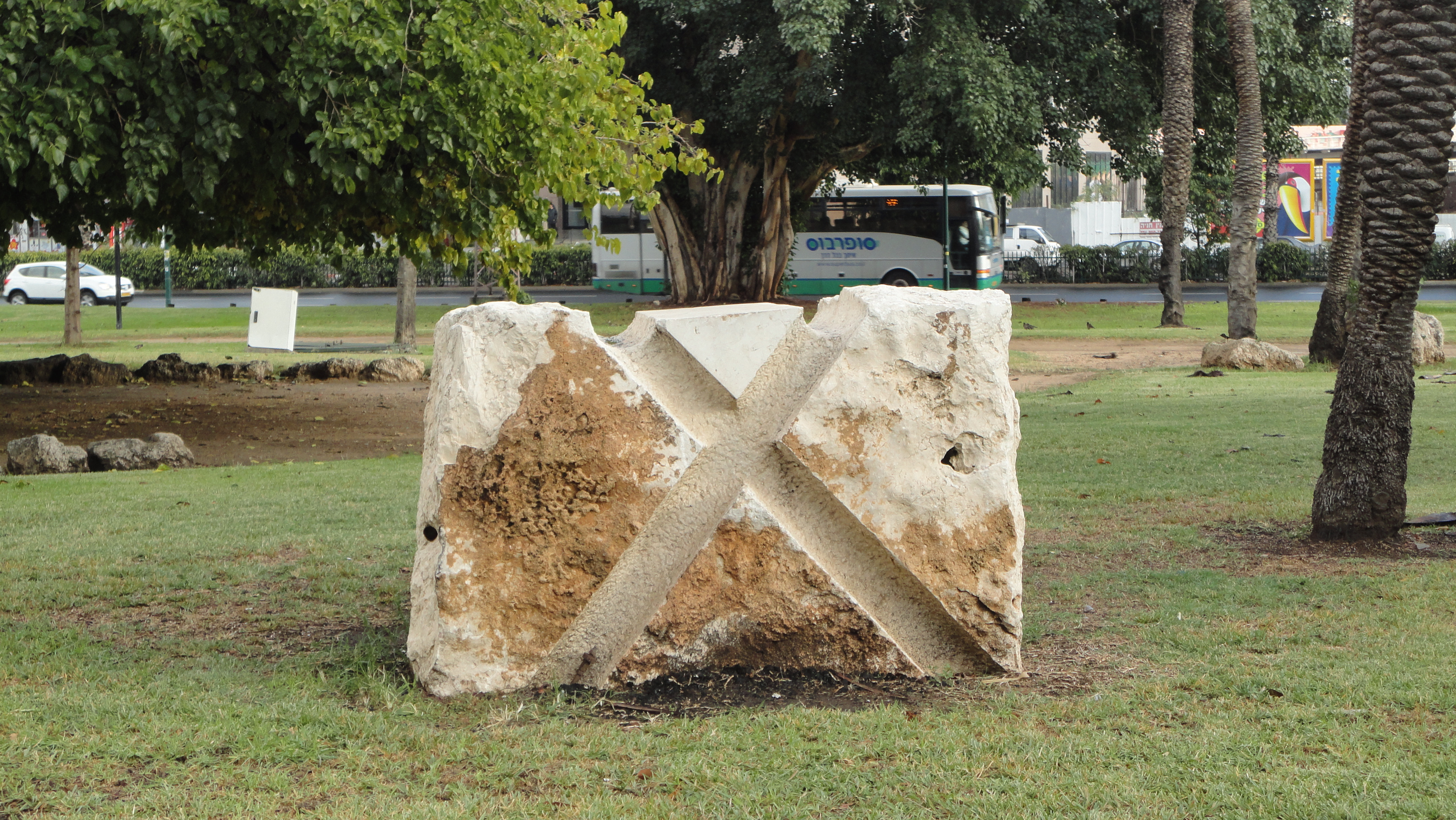 Sculpture